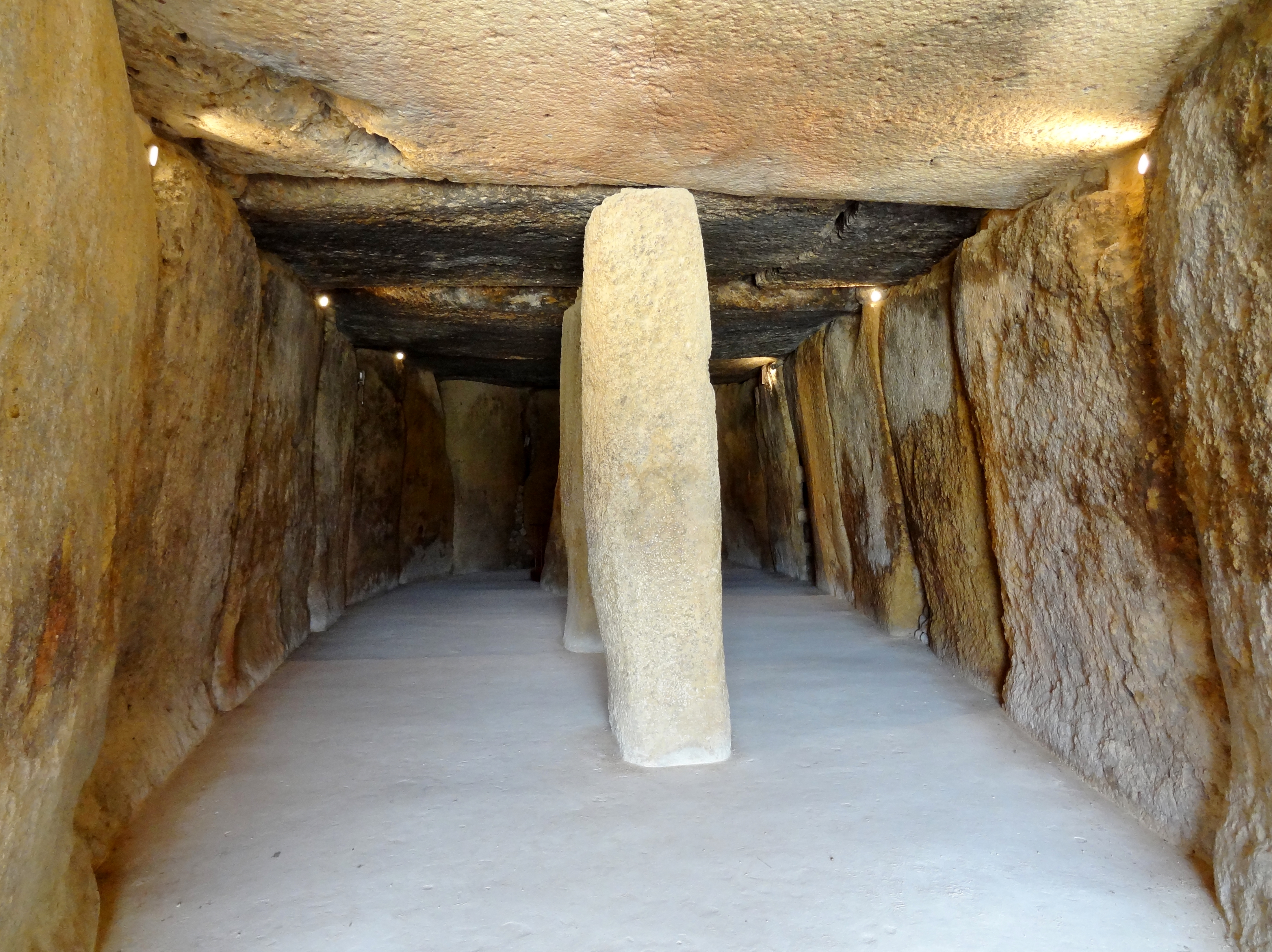 Dolmen de Menga in Antequera, Provinz Málaga, Spanien